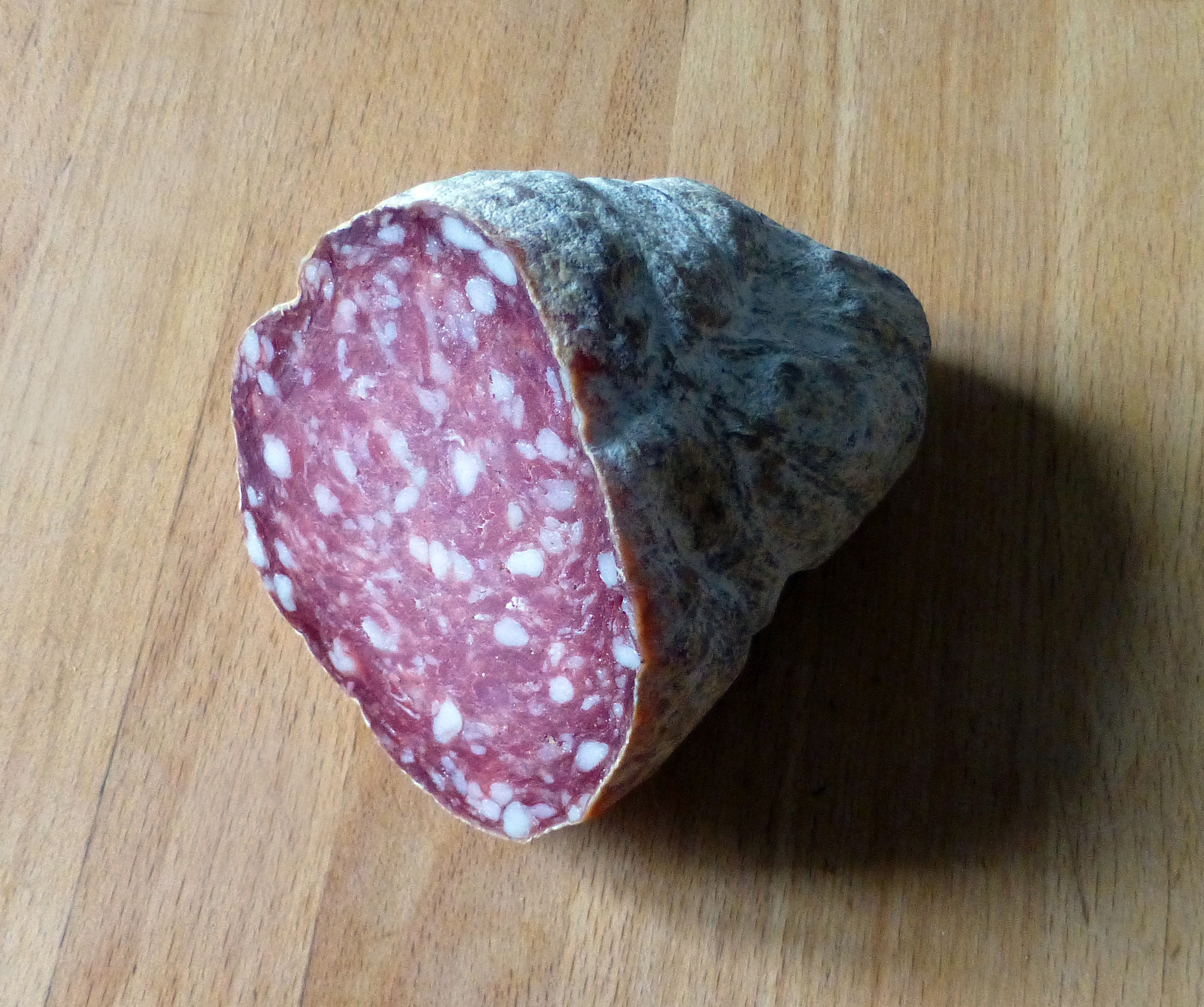 Saucisson Jésus, une spécialité lyonnaise.